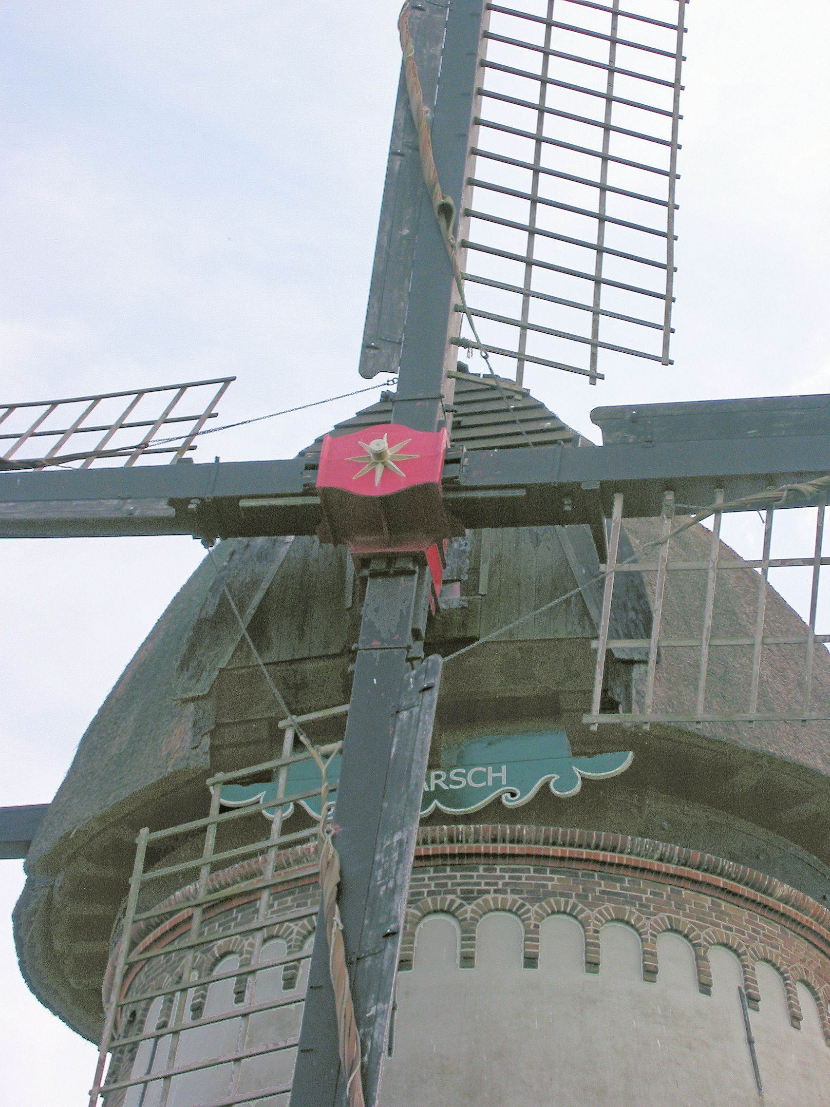 Kap met baard poldermolen De Marsch Lienden, Gelderland, the Netherlands